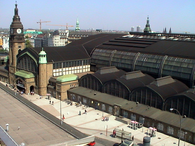 Hauptbahnhof Hamburg.This is a photograph of an architectural monument.